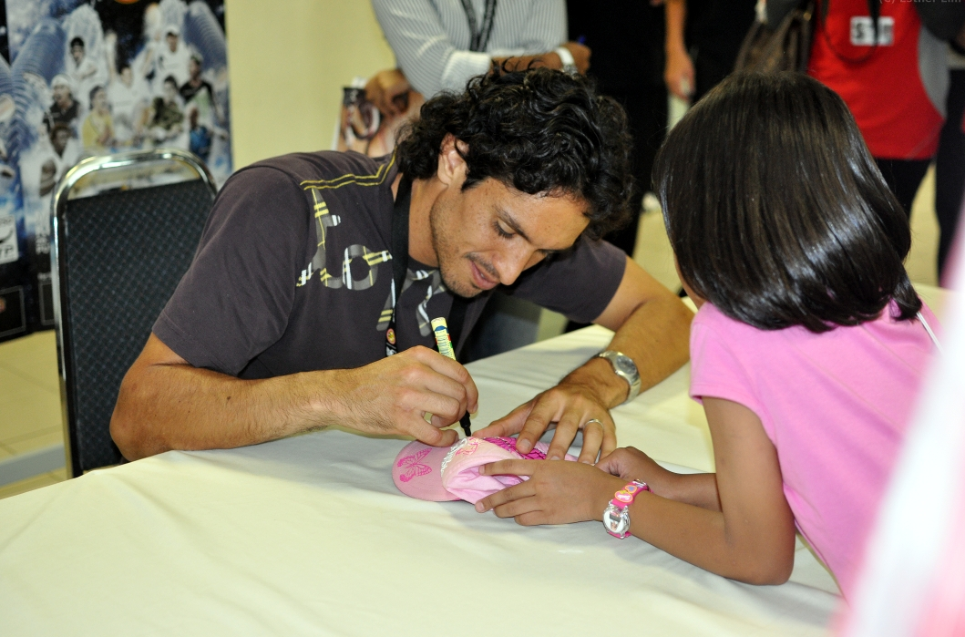 Martín Vassallo Argüello signing autographs.